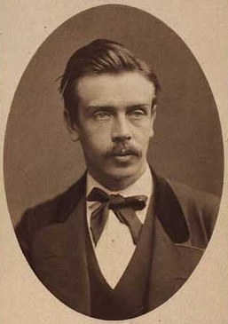 Hans Frederik "Fritz" Helweg-Larsen (1856-1917), Danish lawyer